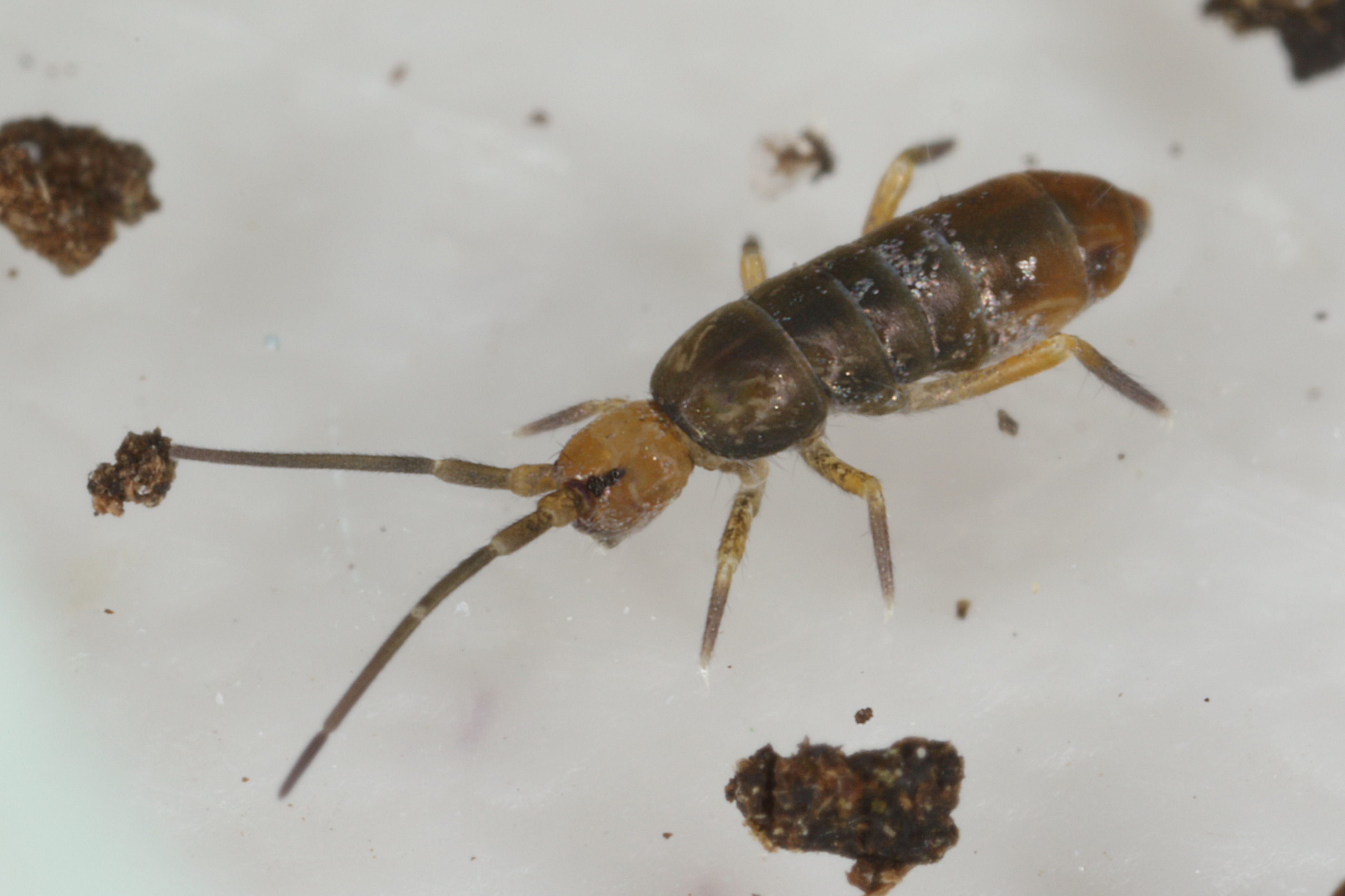 Tomocerus minor (Lubbock, 1862), sifted from leaf litter, Søborg, Denmark, 14 April 2016